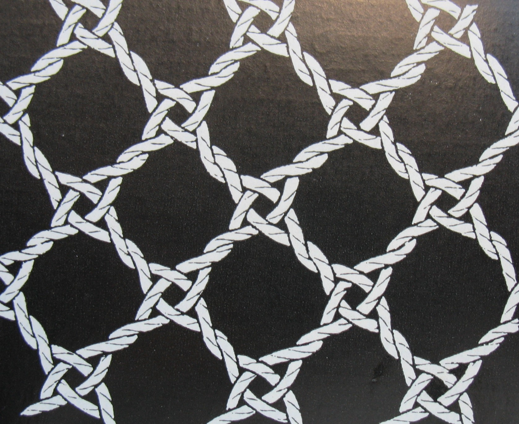 Schema: Torchongrund (Klöppelspitze) Česky: Schemat. nakres torchonskeho podkladu palickovane krajky